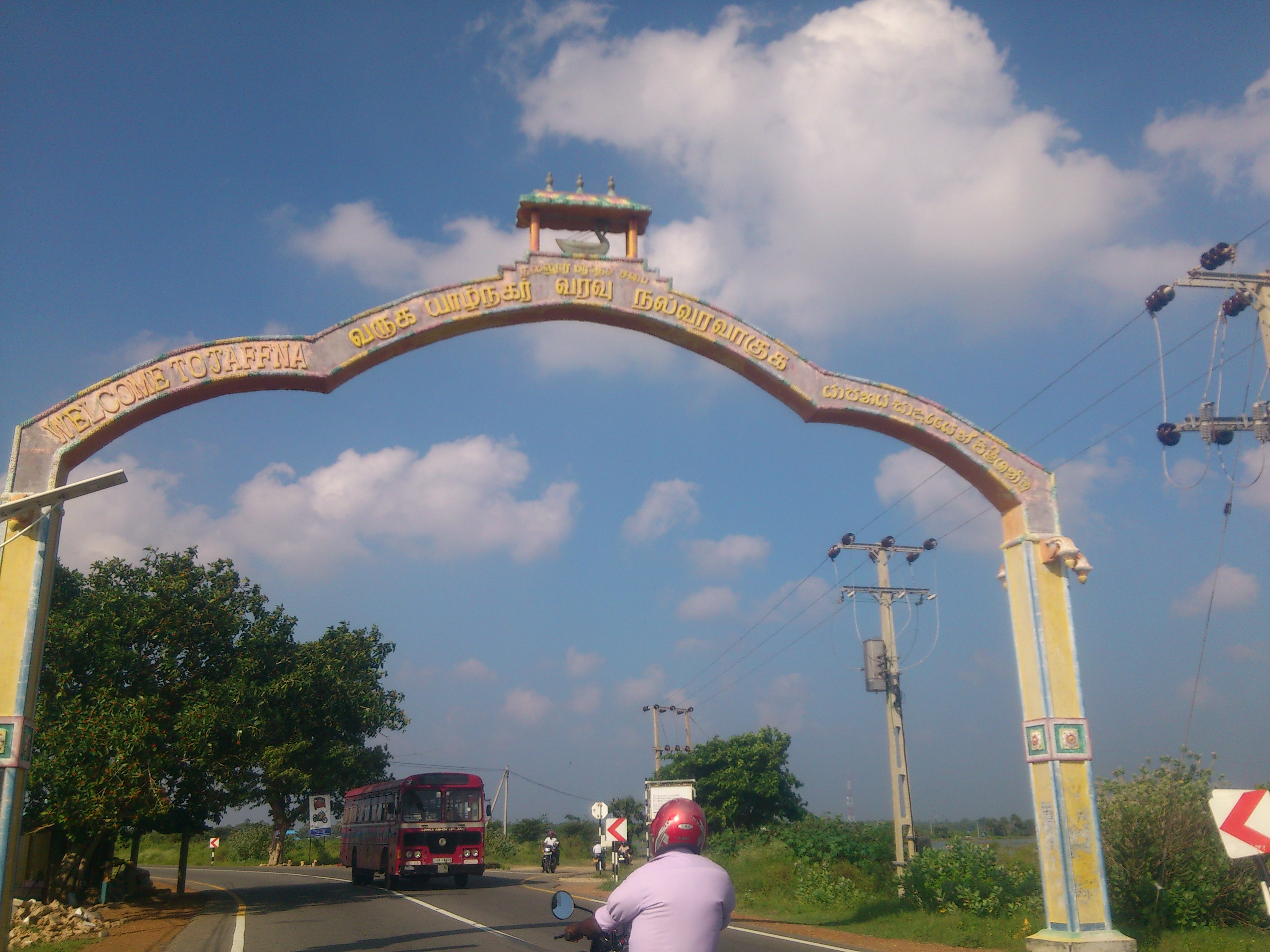 வரவேற்பு வளைவு